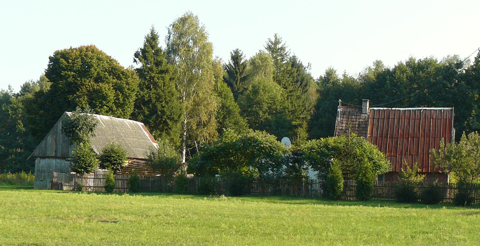 Wieś olęderska Przyłęk koło Nw. Tomyśla.